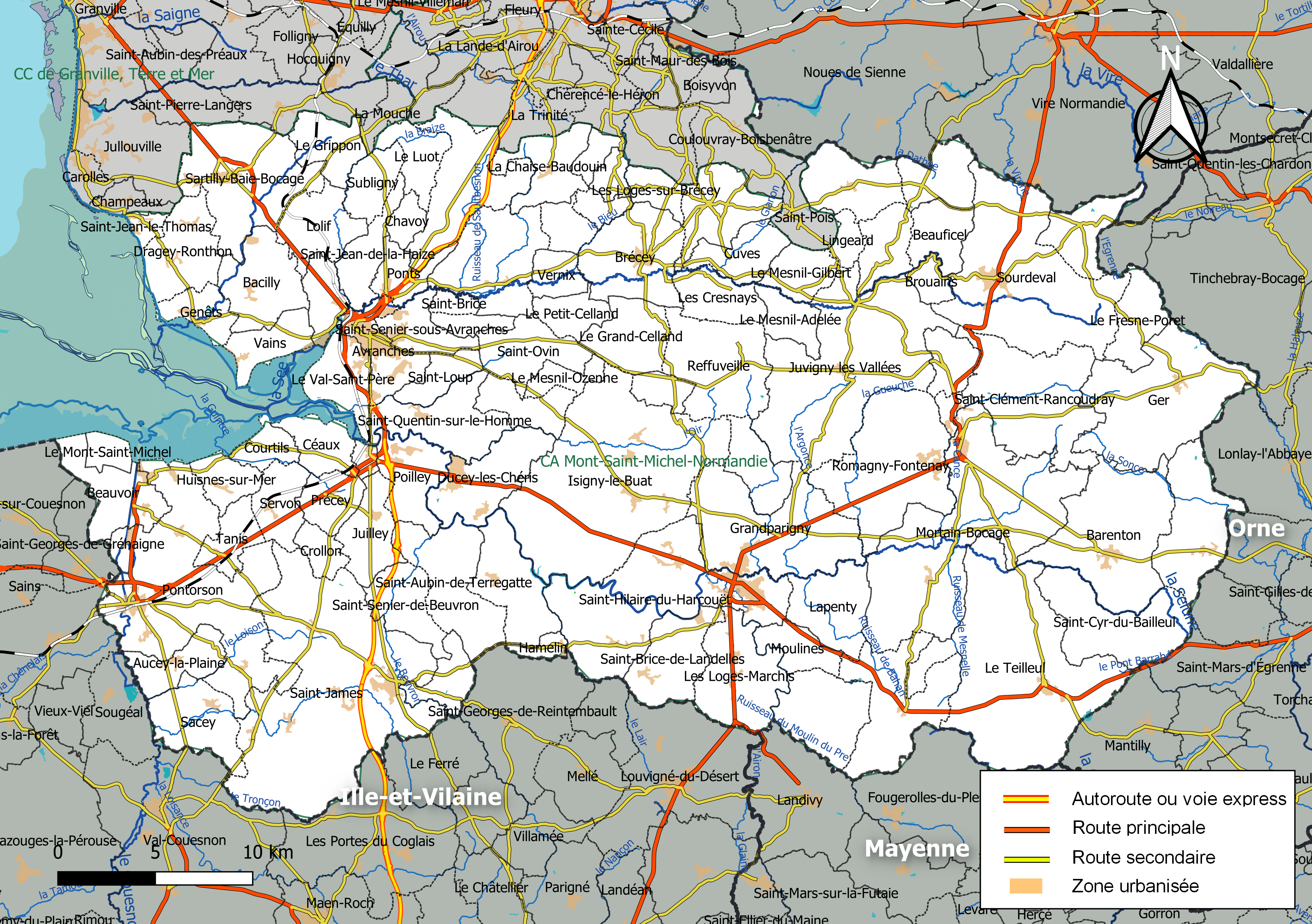 Carte géographique de la Communauté d'agglomération Mont-Saint-Michel-Normandie, département de la Manche, France. Composition au 1er janvier 2019.